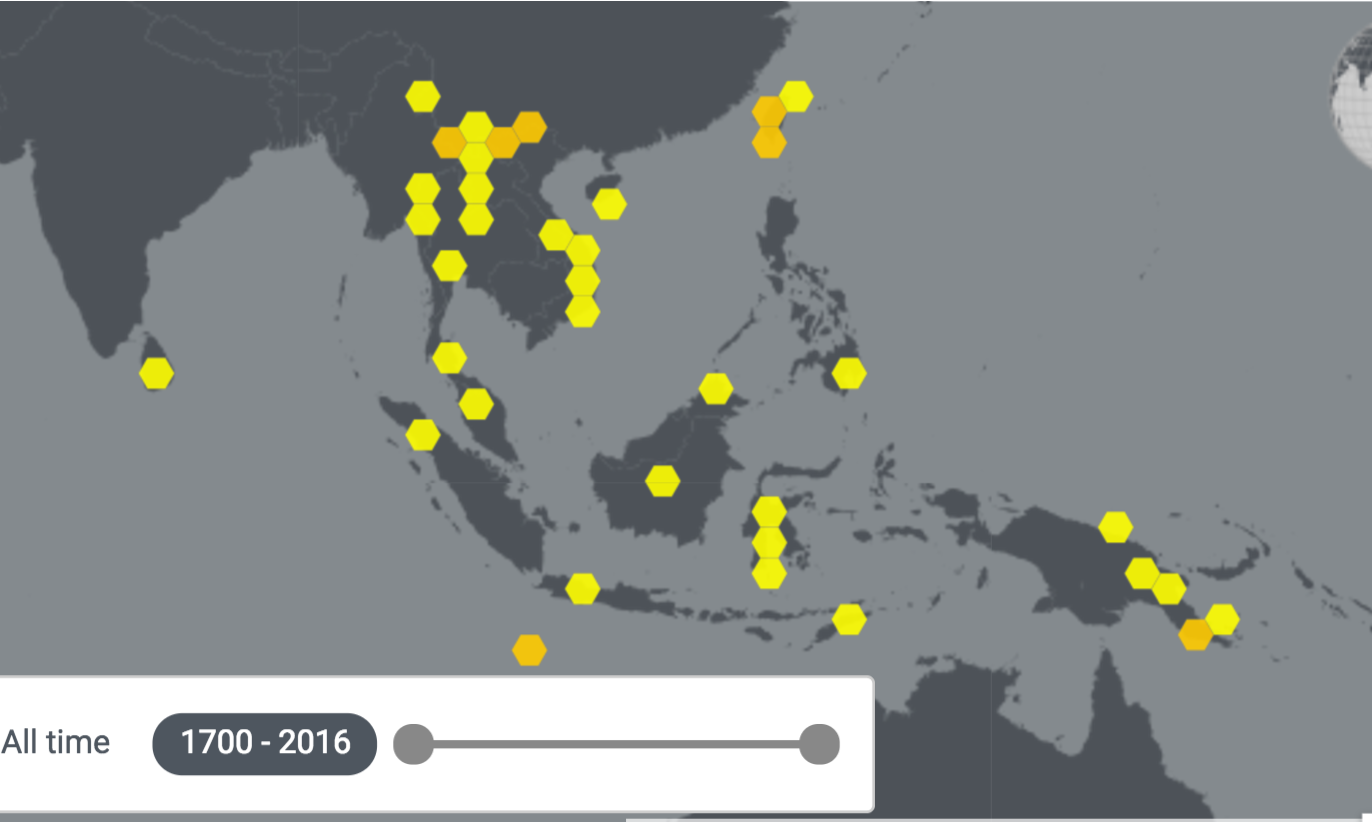 Leptochilus decurrens